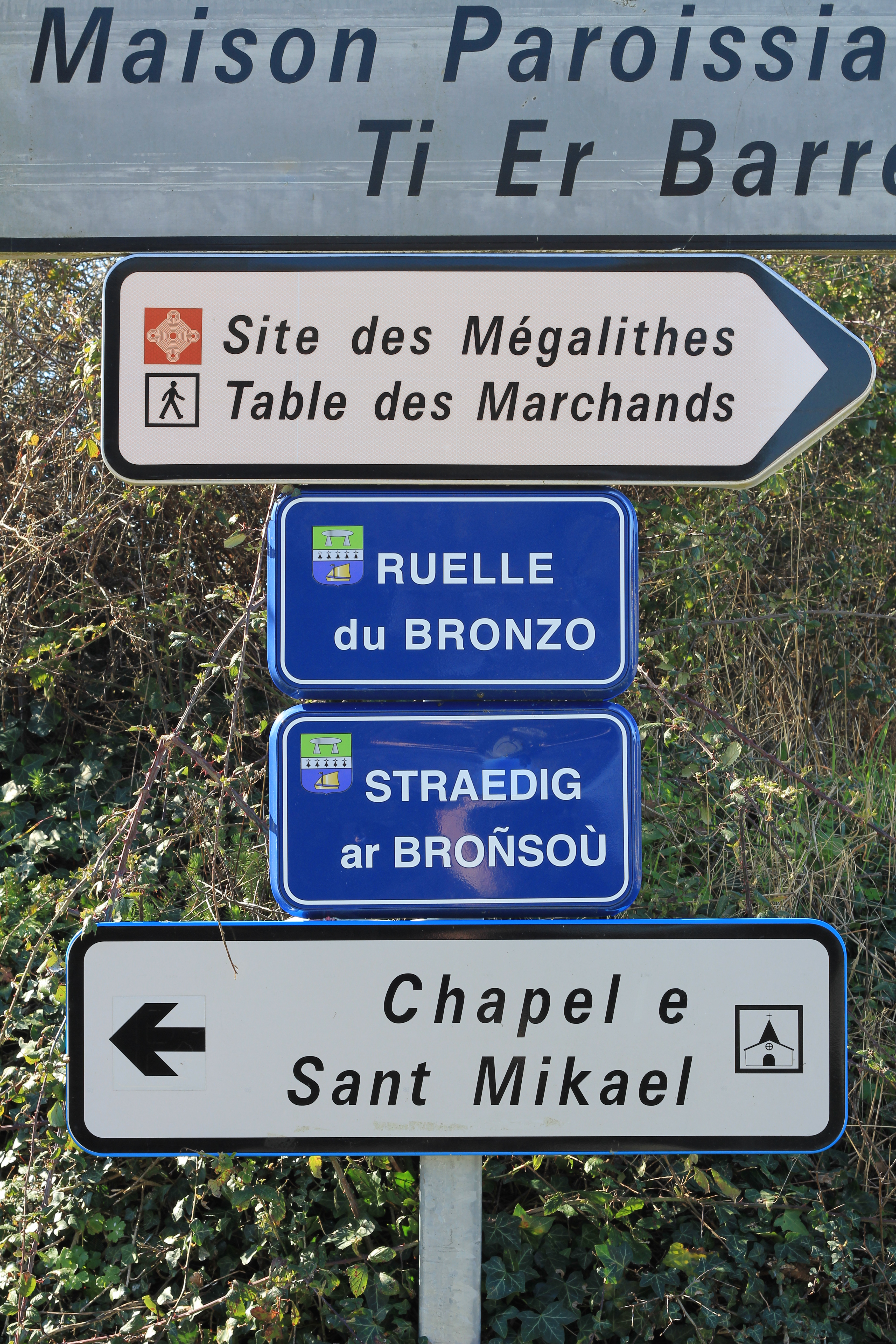 Menhir du Bronso donne son nom à la rue où il est situé. Affichage bilingue français breton des monuments proches. .